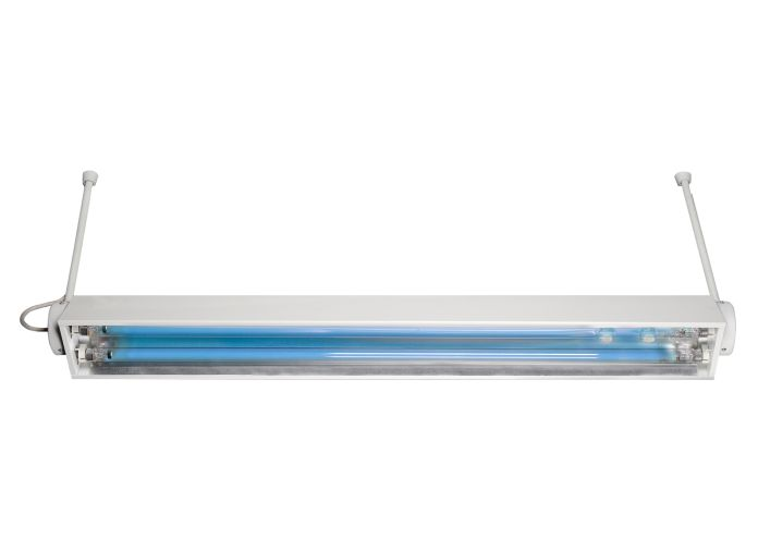 Бактерицидный облучатель Сибэст ОБС М2